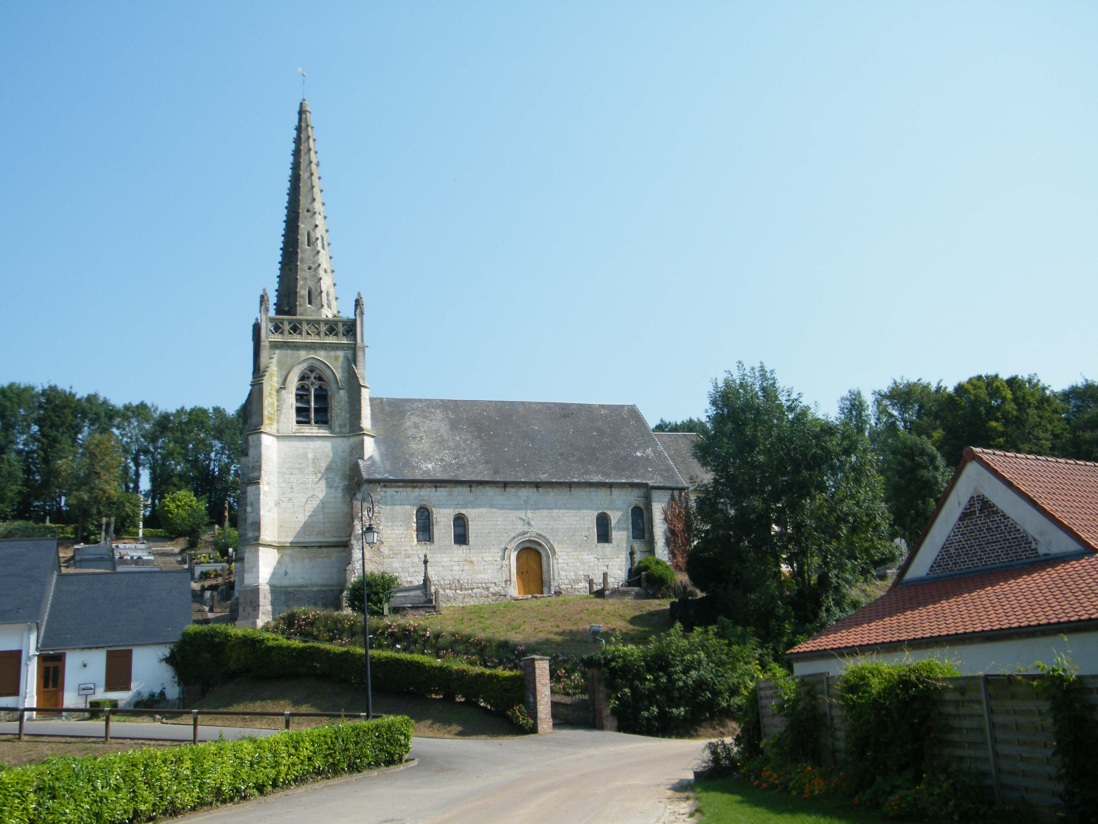 église.